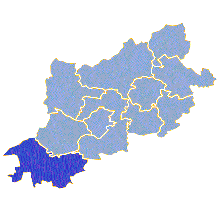 Powiat zielonogórski - Gmina Nowogród Bobrzański